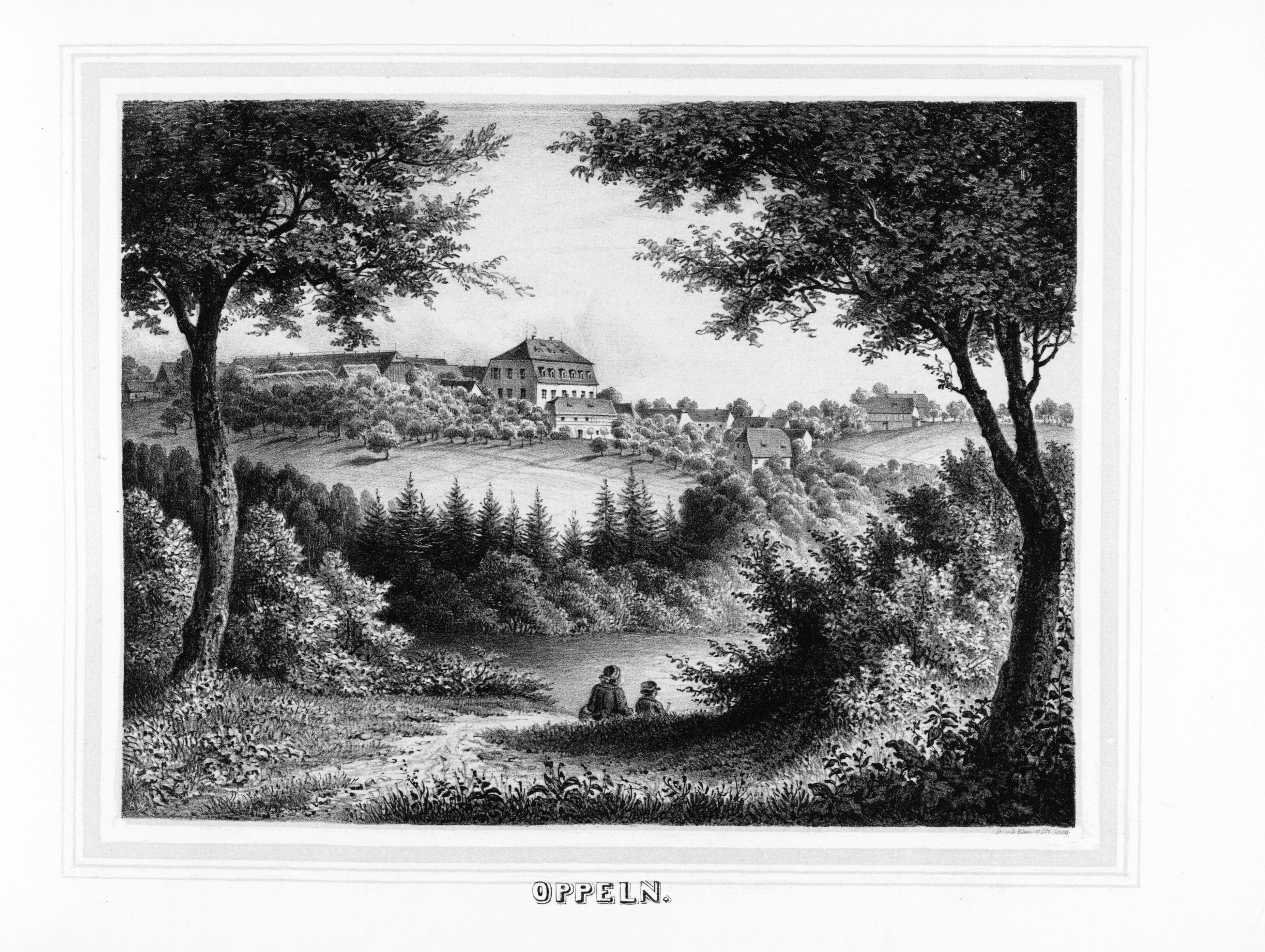 Oppeln aus: Album der Rittergüter und Schlösser im Königreiche Sachsen Markgrafenthum Oberlausitz Section: III